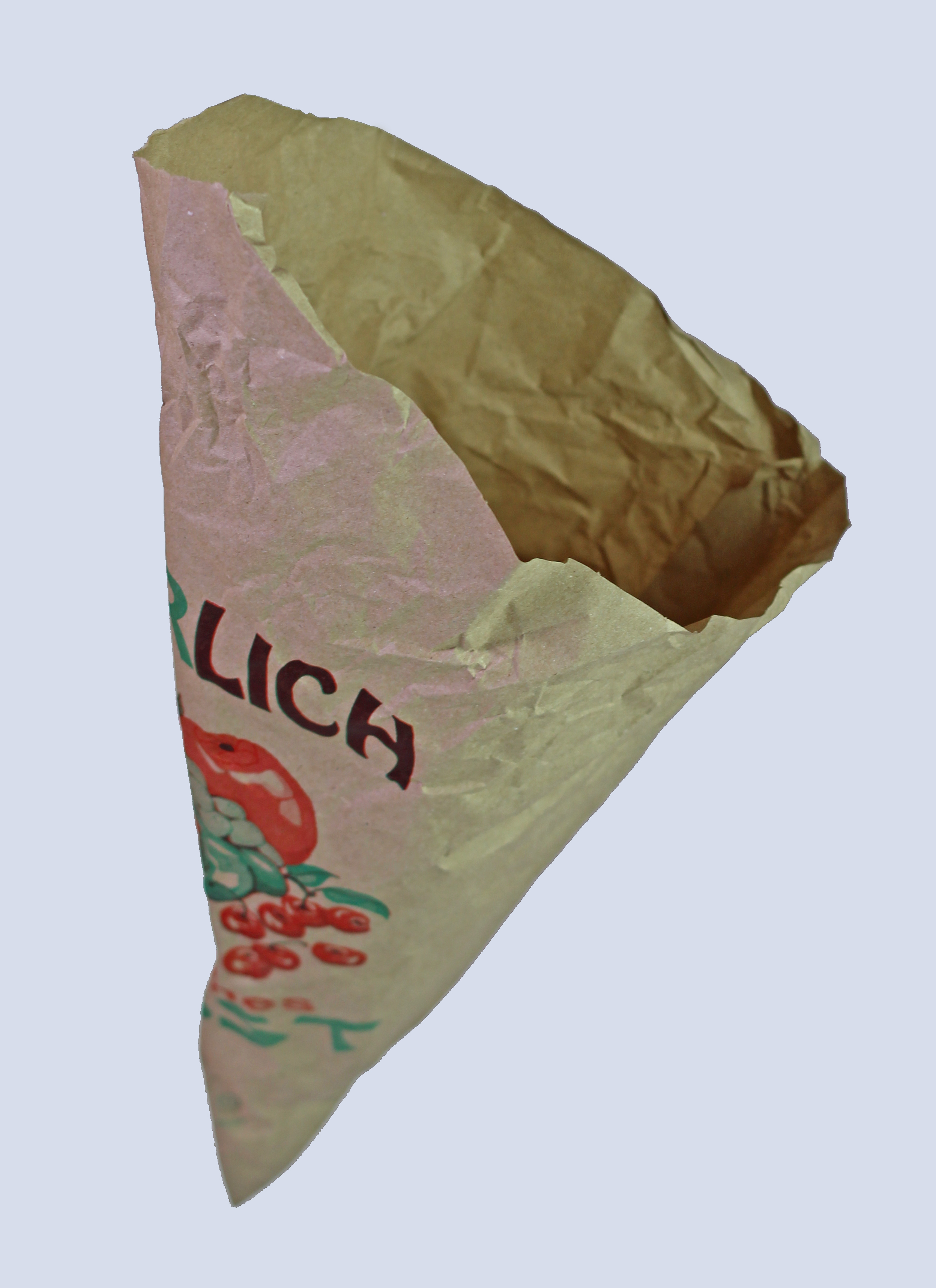 Bildinhalt: leere braune geklebte Spitztüte mit Aufdruck vor grauem Hintergrund Aufnahmeort: Frankfurt am Main, Deutschland